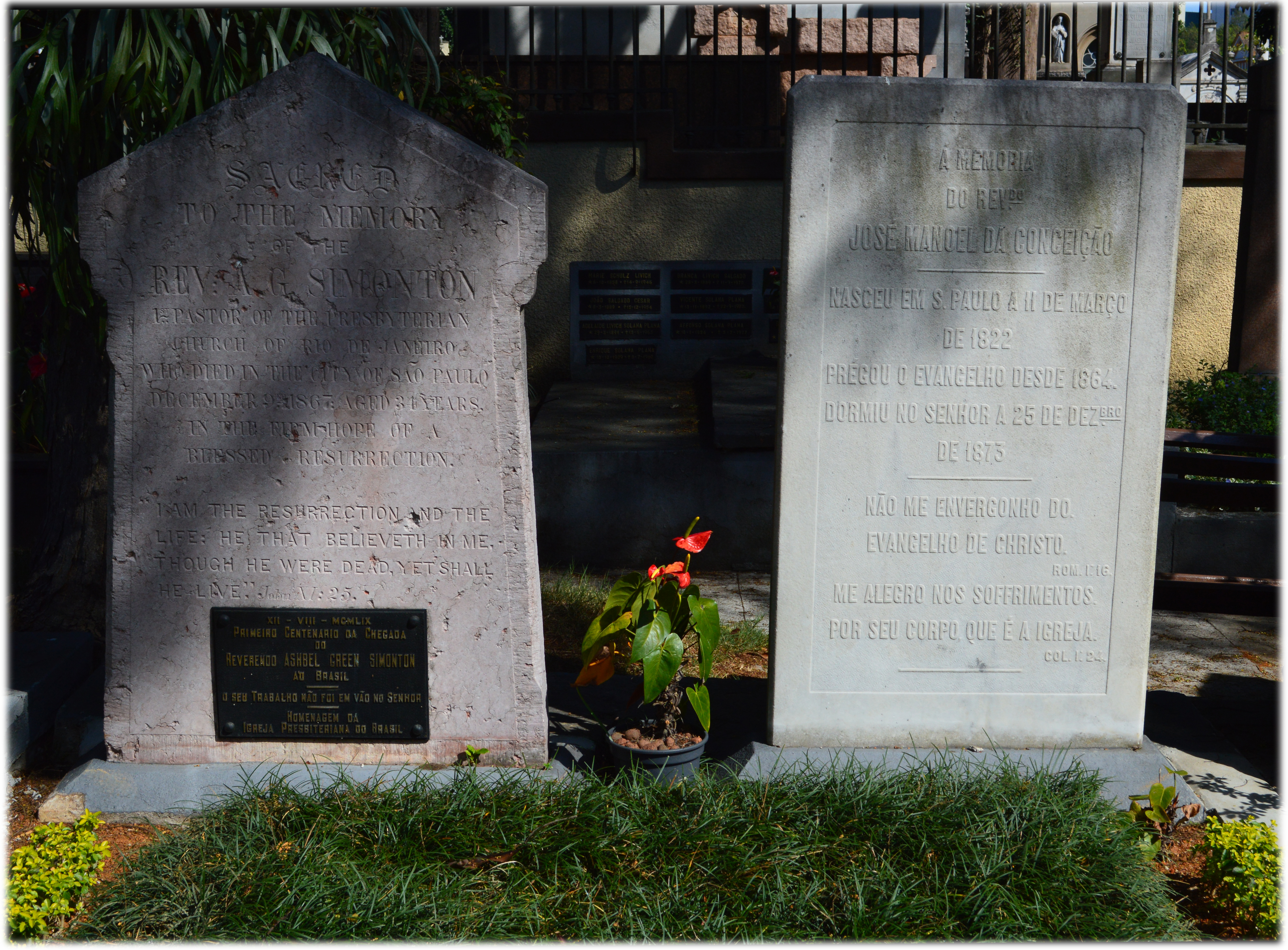 Enterrados lado a lado, sepultura do fundador da Igreja Presbiteriana do Brasil ao lado da do ex-sacerdote católico que ingressou tal igreja.